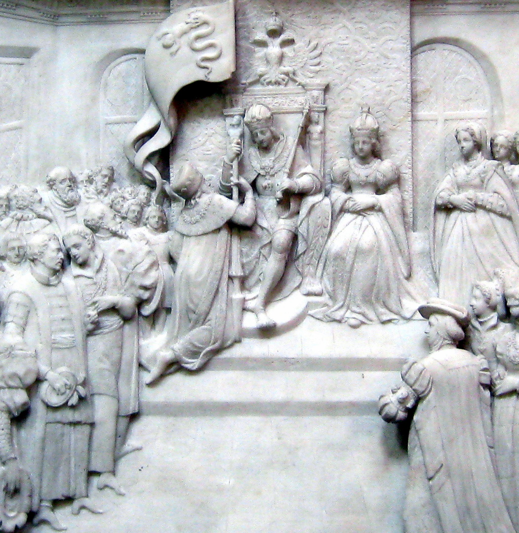 Kenotaph Kaiser Maximilians I., Bildrelief ( Ausschnitt) Ludovico Sforzas Belehnung mit dem Herzogtum Mailand durch Maximilian I.